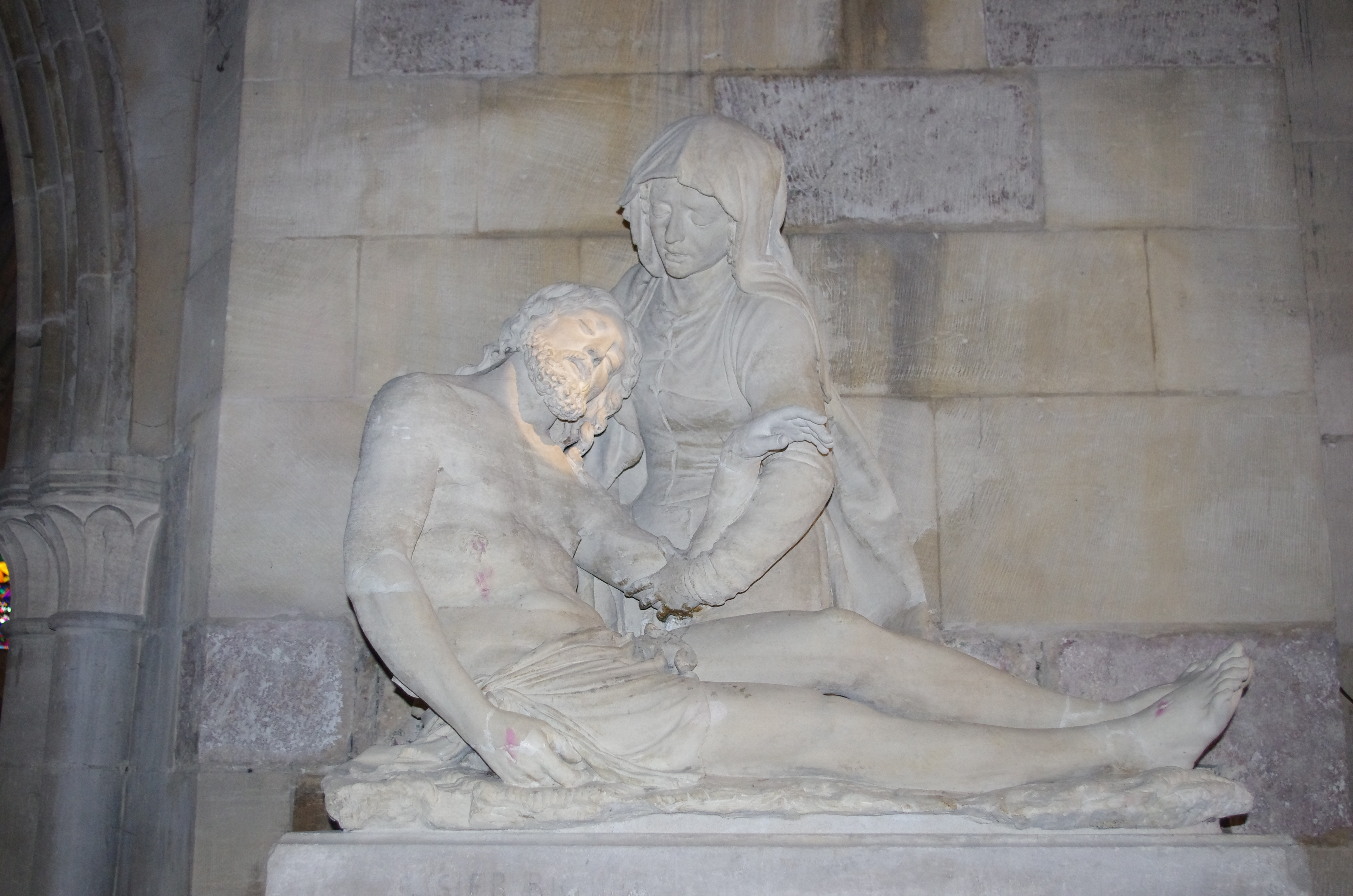 Étain im Department Meuse in Frankreich. Die Pieta stammt von Ligier Richier und befindet sich in der Kirche von Étain.